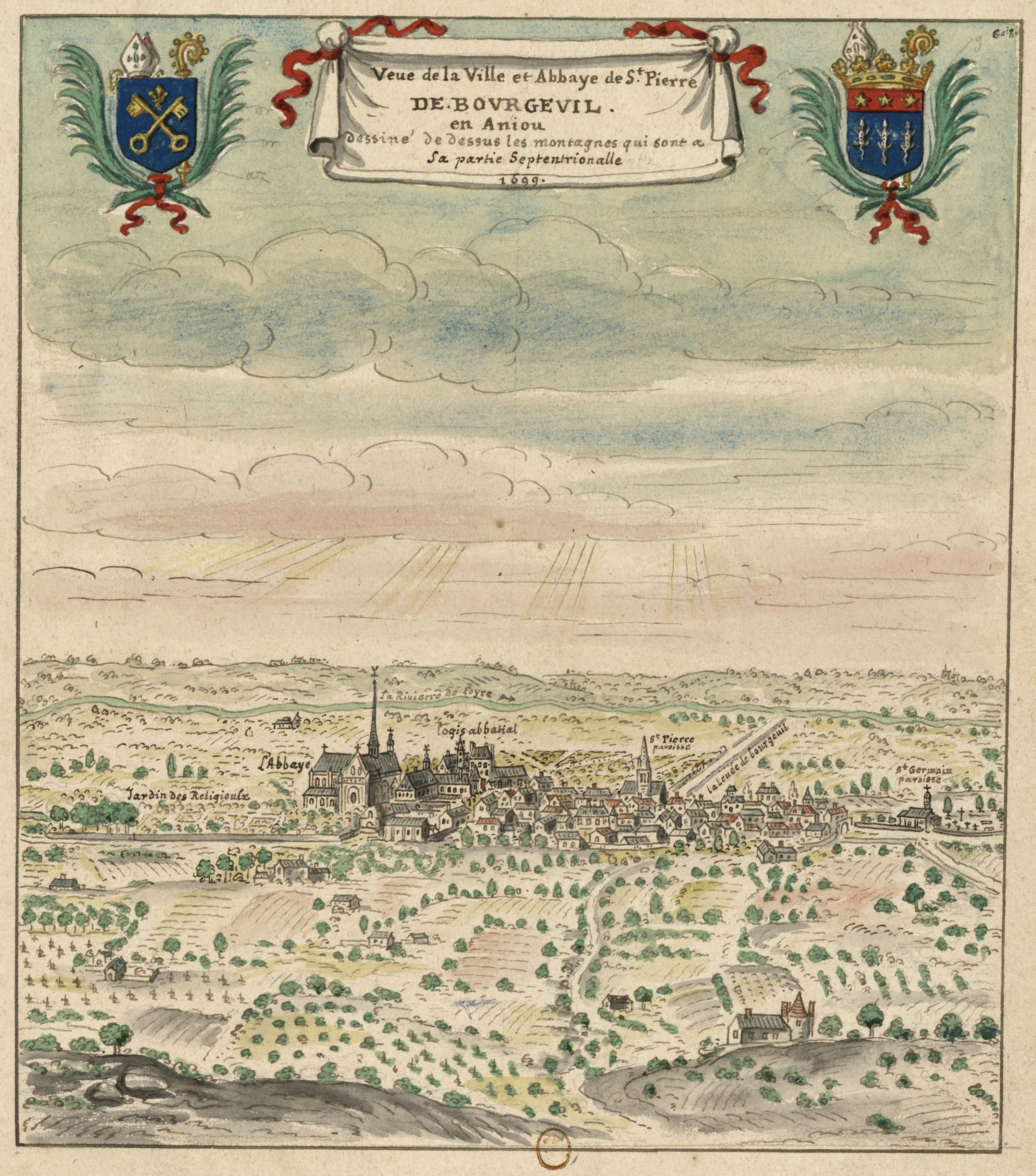 abbaye de Bourgueil Anjou Famille Le Clerc